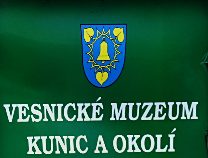 Zámek Berchtold